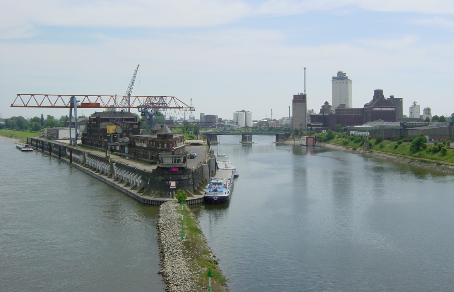 Rheinhafen, Krefeld